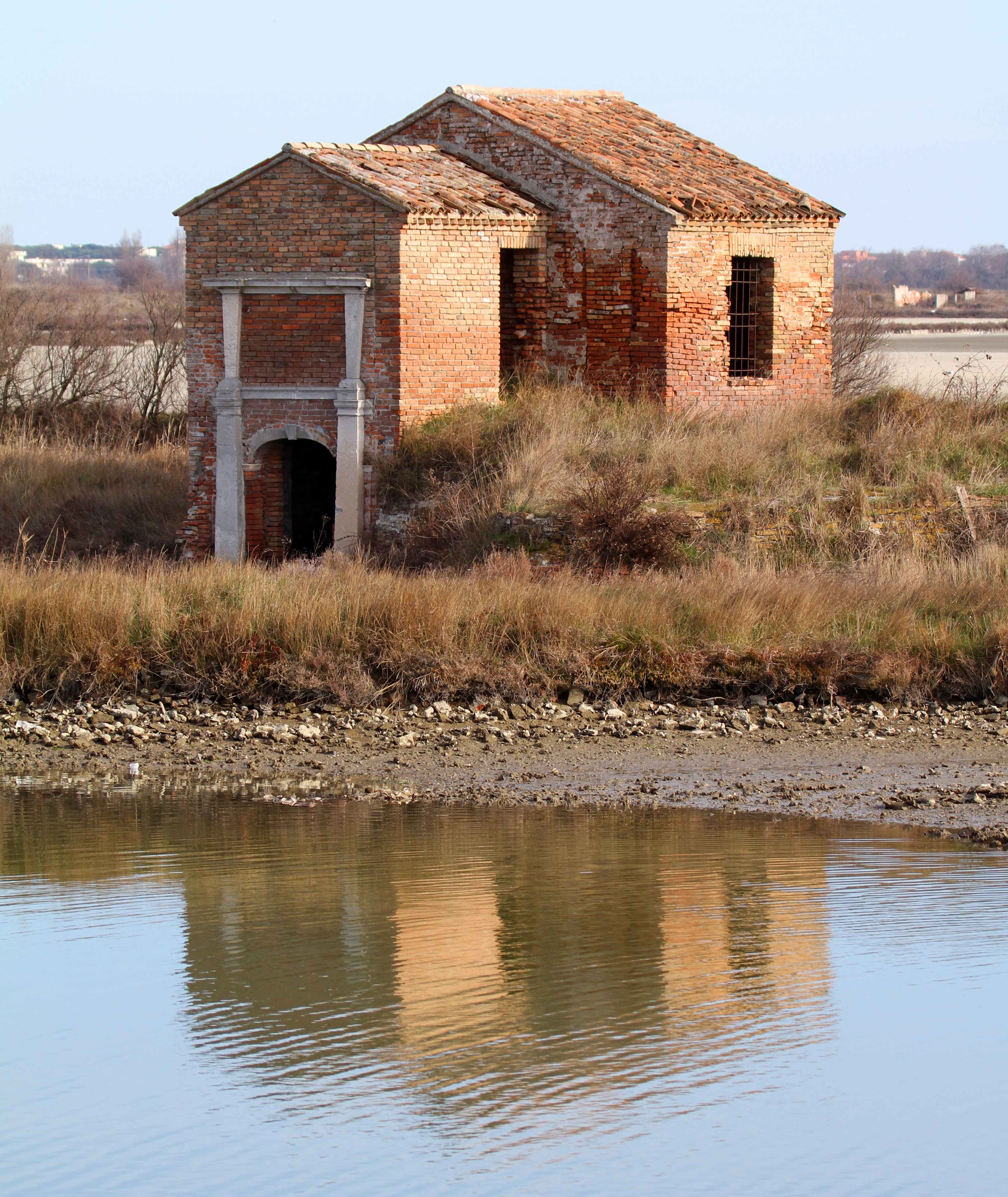 Rudere di edificio presso le antiche saline di Comacchio